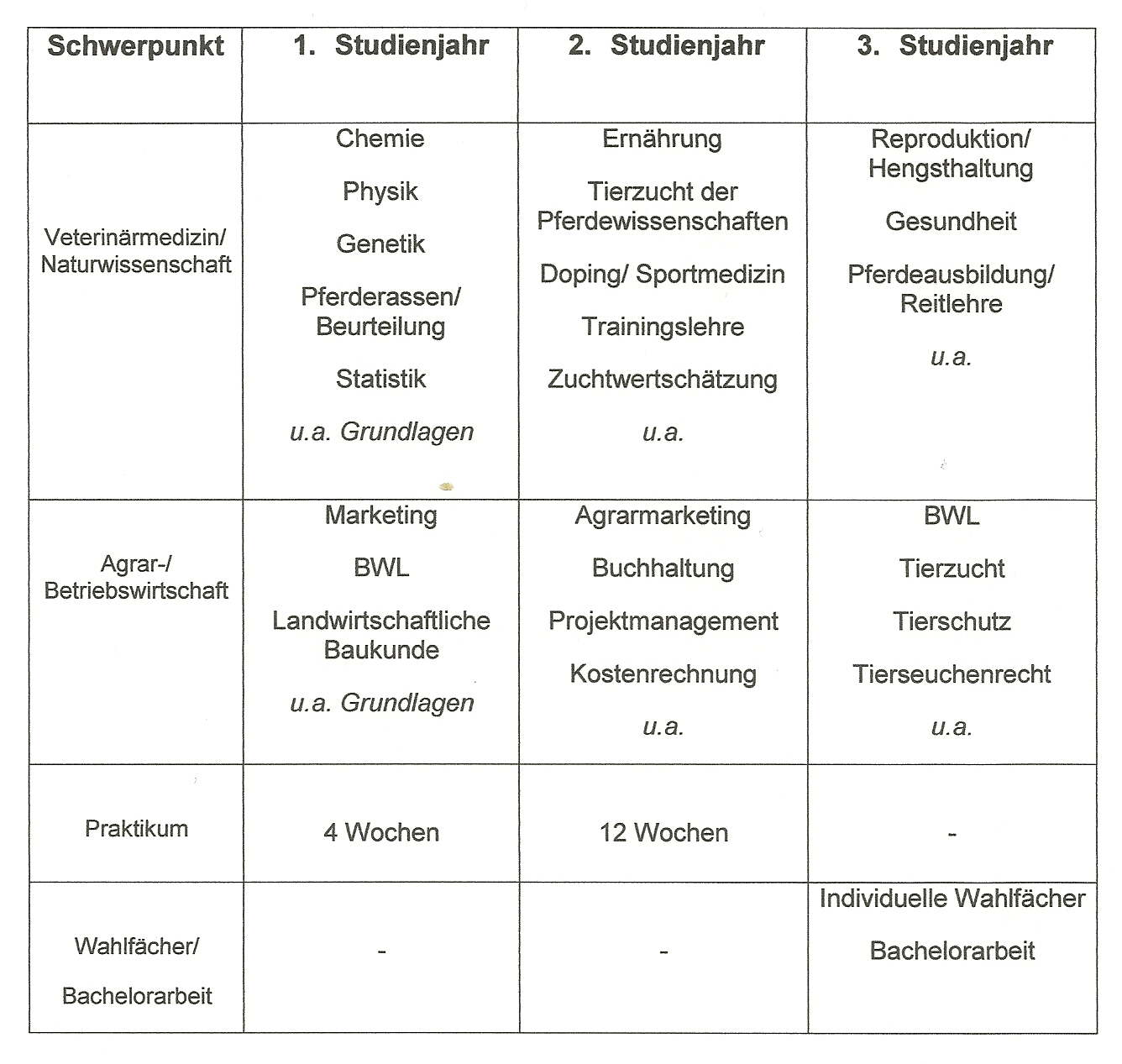 Modulplan Wien Schwerpunkt 1. Studienjahr 2. Studienjahr 3. Studienjahr Veterinärmedizin/ Naturwissenschaft Chemie Physik Genetik Pferderassen/ Beurteilung Statistik u.a. Grundlagen Ernährung Tierzucht der Pferdewissenschaften Doping/ Sportmedizin Trainingslehre Zuchtwertschätzung u.a. Reproduktion/ Hengsthaltung Gesundheit Pferdeausbildung/ Reitlehre u.a. Agrar-/ Betriebswirtschaft Marketing BWL Landwirtschaftliche Baukunde u.a. Grundlagen Agrarmarketing Buchhaltung Projektmanagement Kostenrechnung u.a. BWL Tierzucht Tierschutz Tierseuchenrecht u.a. Praktikum 4 Wochen 12 Wochen - Wahlfächer/ Bachelorarbeit - - Individuelle Wahlfächer Bachelorarbeit